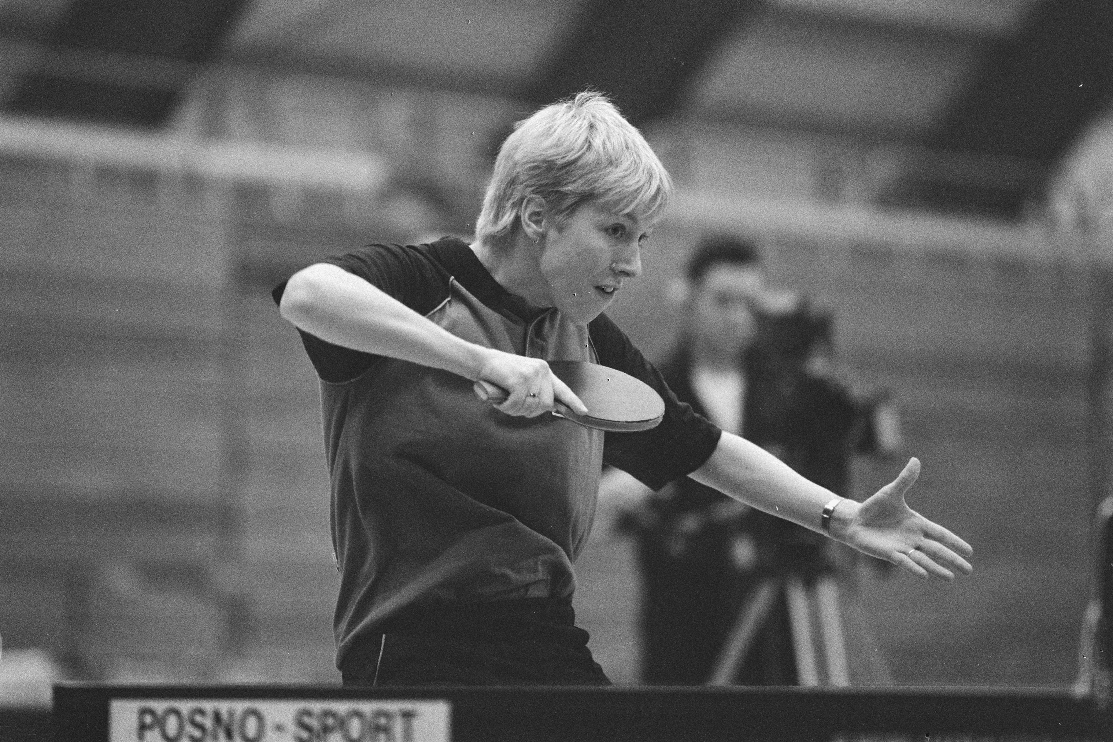 Collectie / Archief : Fotocollectie Anefo Reportage / Serie : [ onbekend ] Beschrijving : NK tafeltennis in Amsterdam; Mirjam Kloppenburg in actie Datum : 21 december 1986 Locatie : Amsterdam, Noord-Holland Trefwoorden : tafeltennis Persoonsnaam : Kloppenburg, Mirjam Fotograaf : Croes, Rob C. / Anefo, [onbekend] Auteursrechthebbende : Nationaal Archief Materiaalsoort : Negatief (zwart/wit) Nummer archiefinventaris : bekijk toegang 2.24.01.05 Bestanddeelnummer : 933-8472